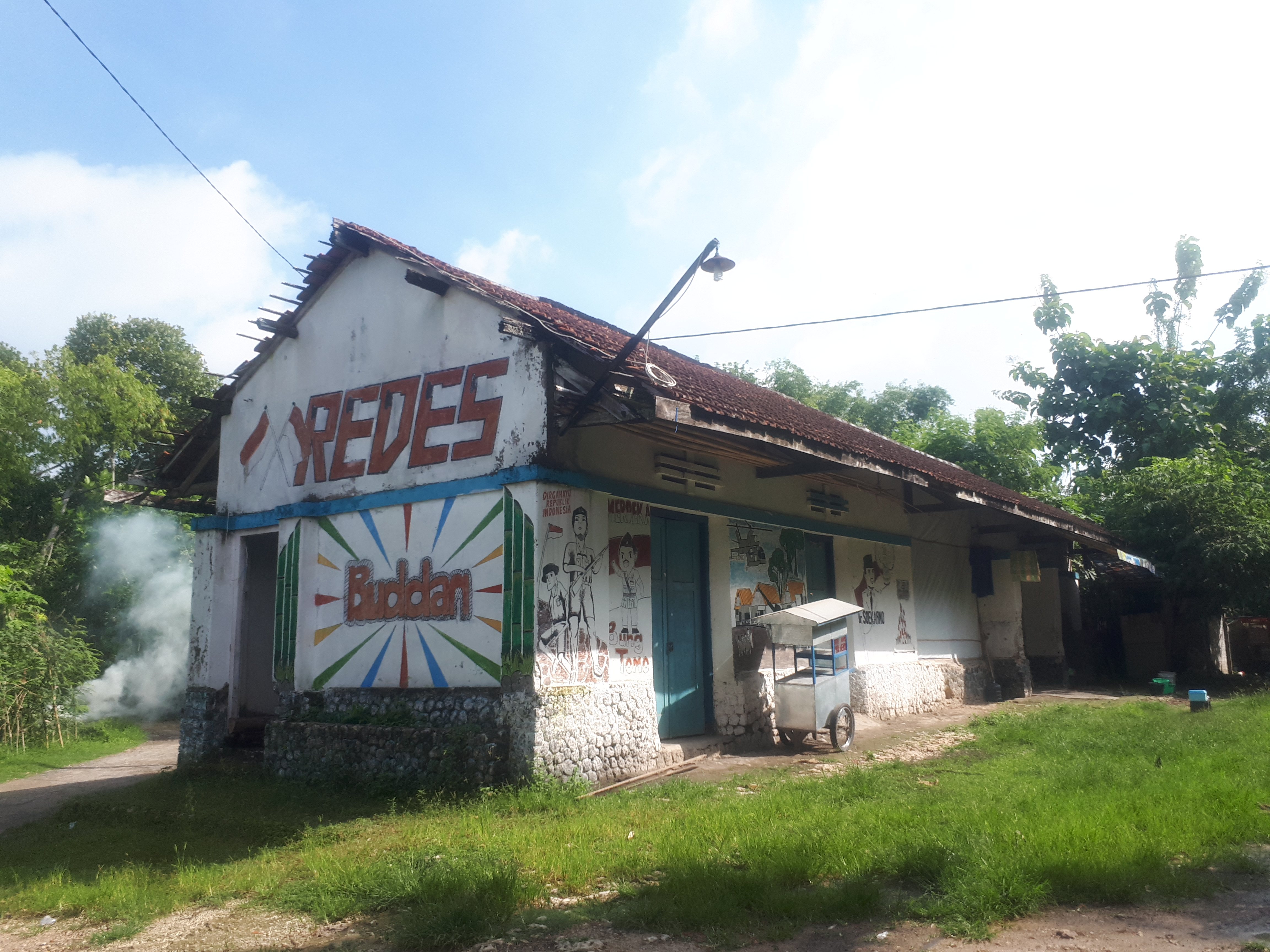 Stasiun Sukolilobaru—lebih dikenal dengan nama Stasiun Buddan—adalah salah satu stasiun non-aktif di Pulau Madura. Stasiun ini terletak di Sukolilo Timur, Labang, Bangkalan, Jawa Timur. Stasiun ini diresmikan oleh Rikuyu Sokyuku